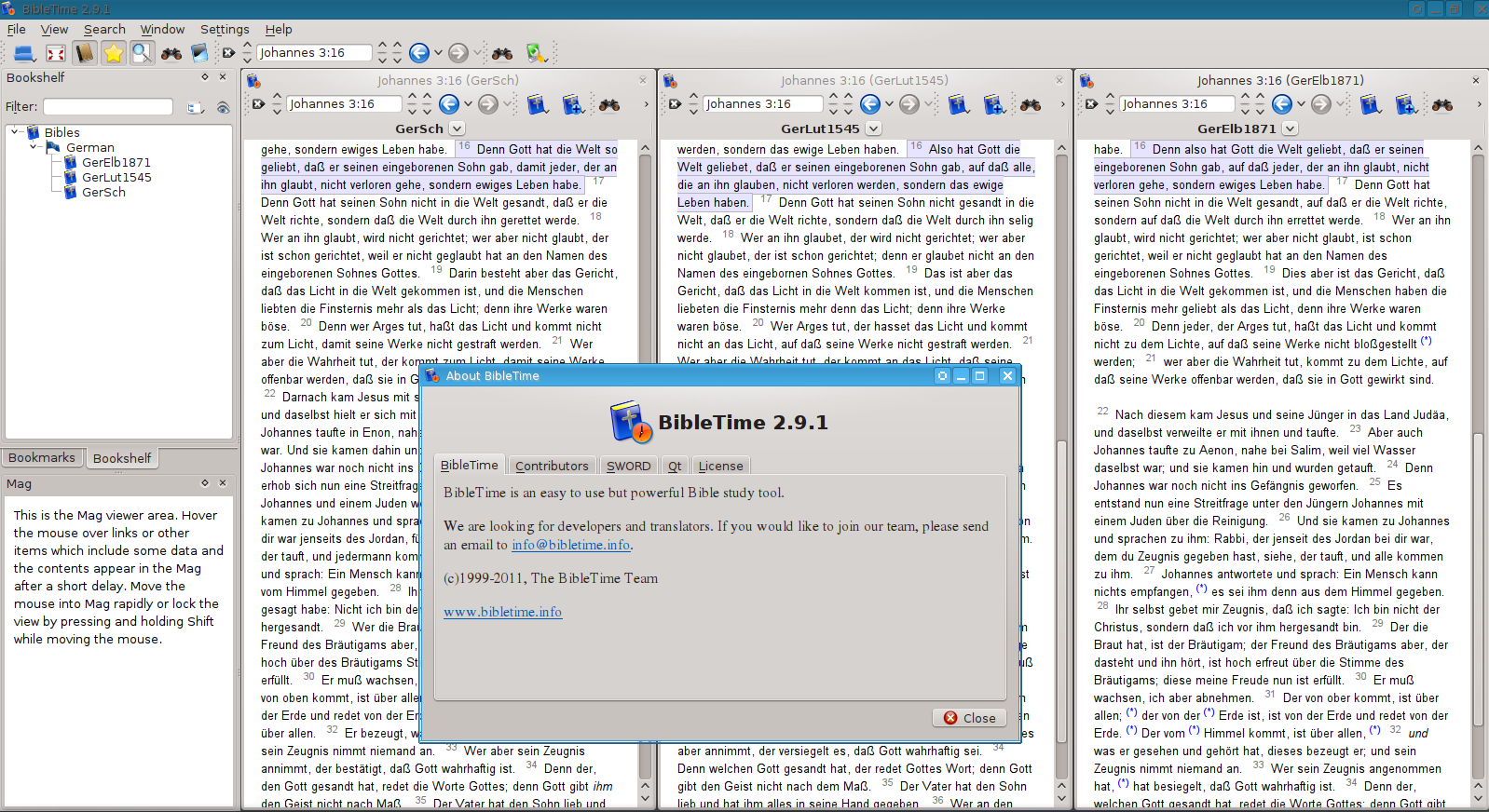 Scheenshott von BibleTime 2.9.1 auf Fedora 16.